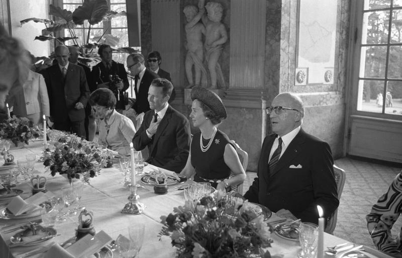 Staatsbesuch des belgischen Königspaares. Empfang im Schloß Benrath